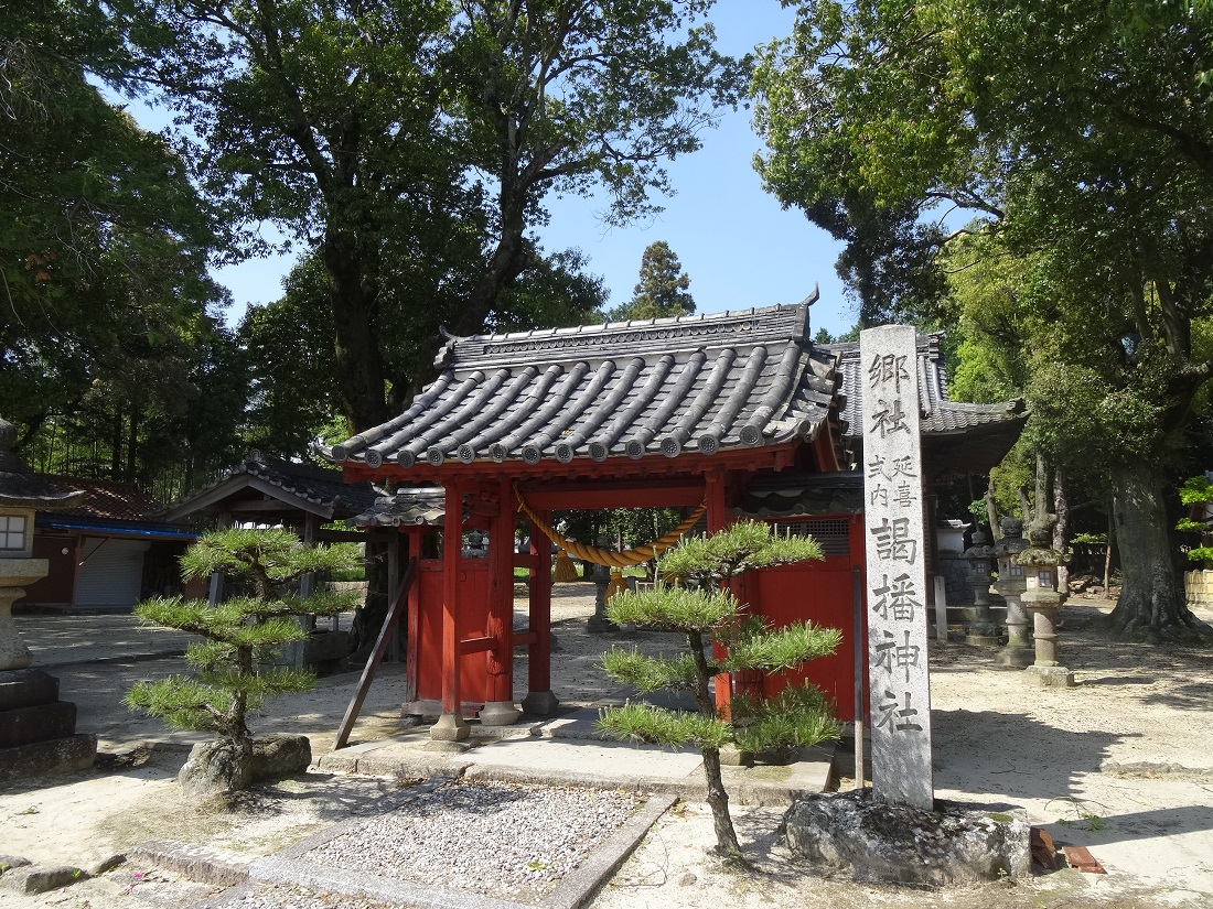 謁播神社（岡崎市東阿知和町）